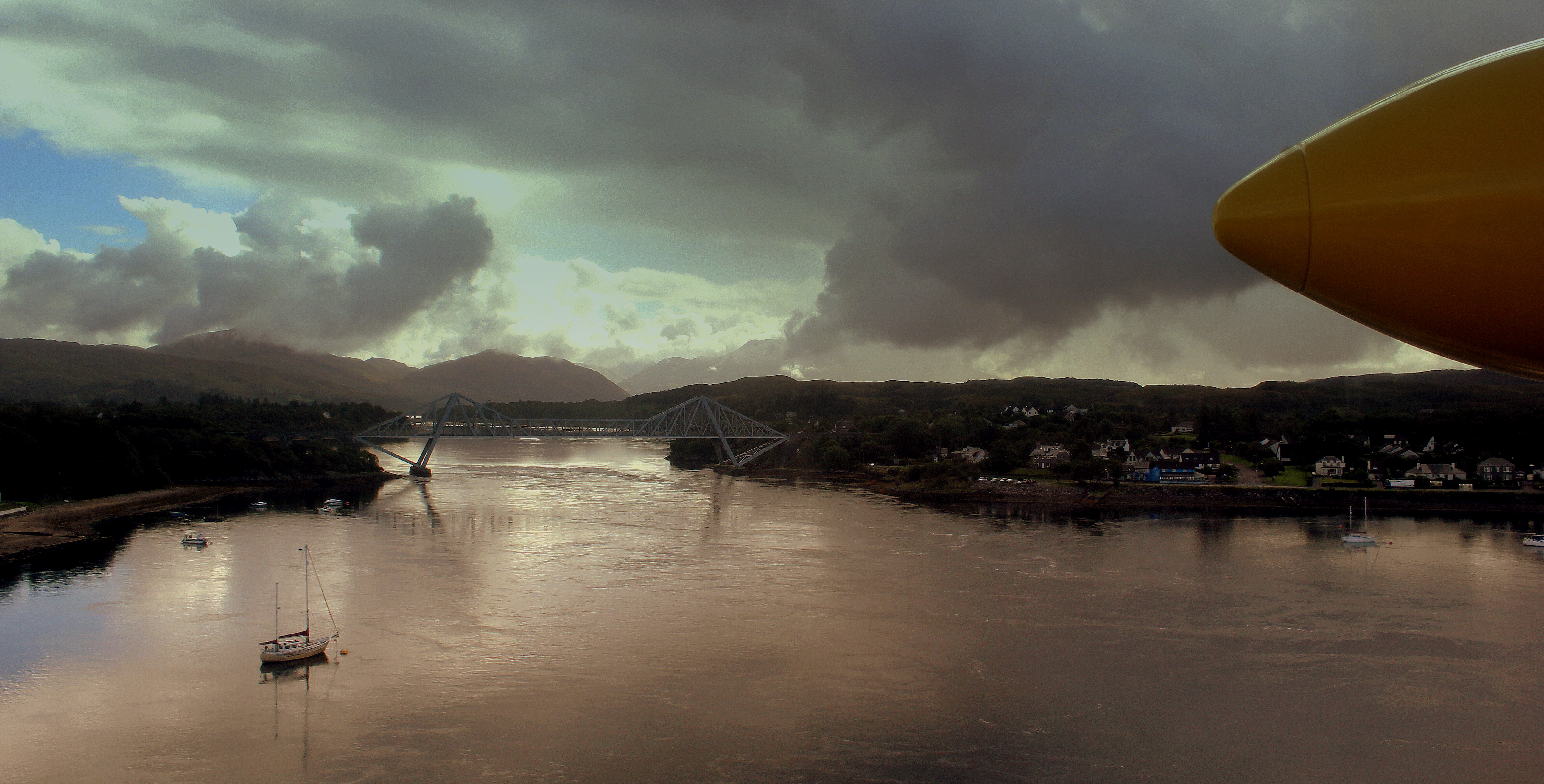 HEBRIDEAN AIR SERVICES FLIGHT 302 G-HEBO BN2B ISLANDER FROM ISLAY TO OBAN ON SHORT FINALS FOR RUNWAY 01 AT OBAN SCOTLAND SEP 2013